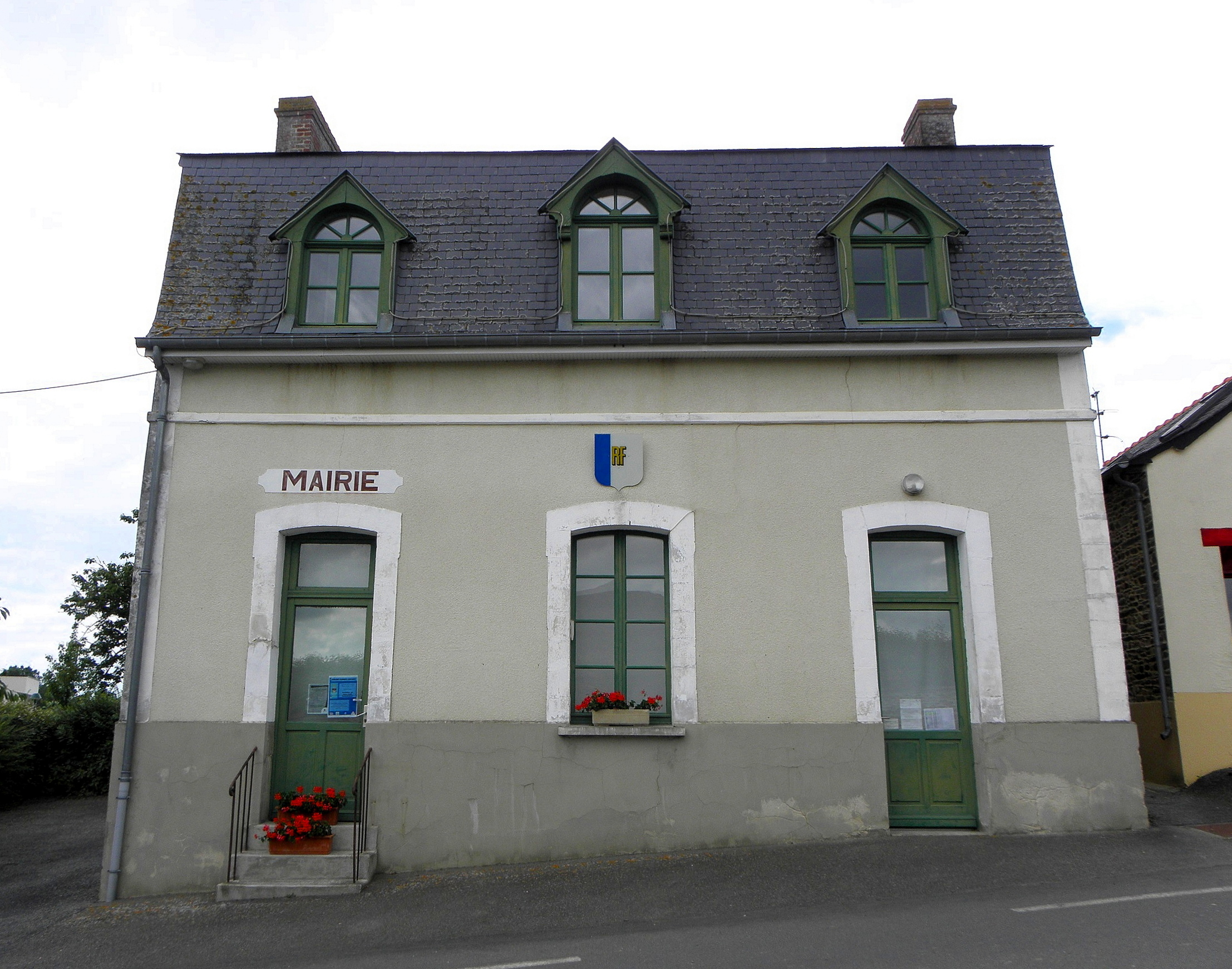 Mairie de Moussé (35).